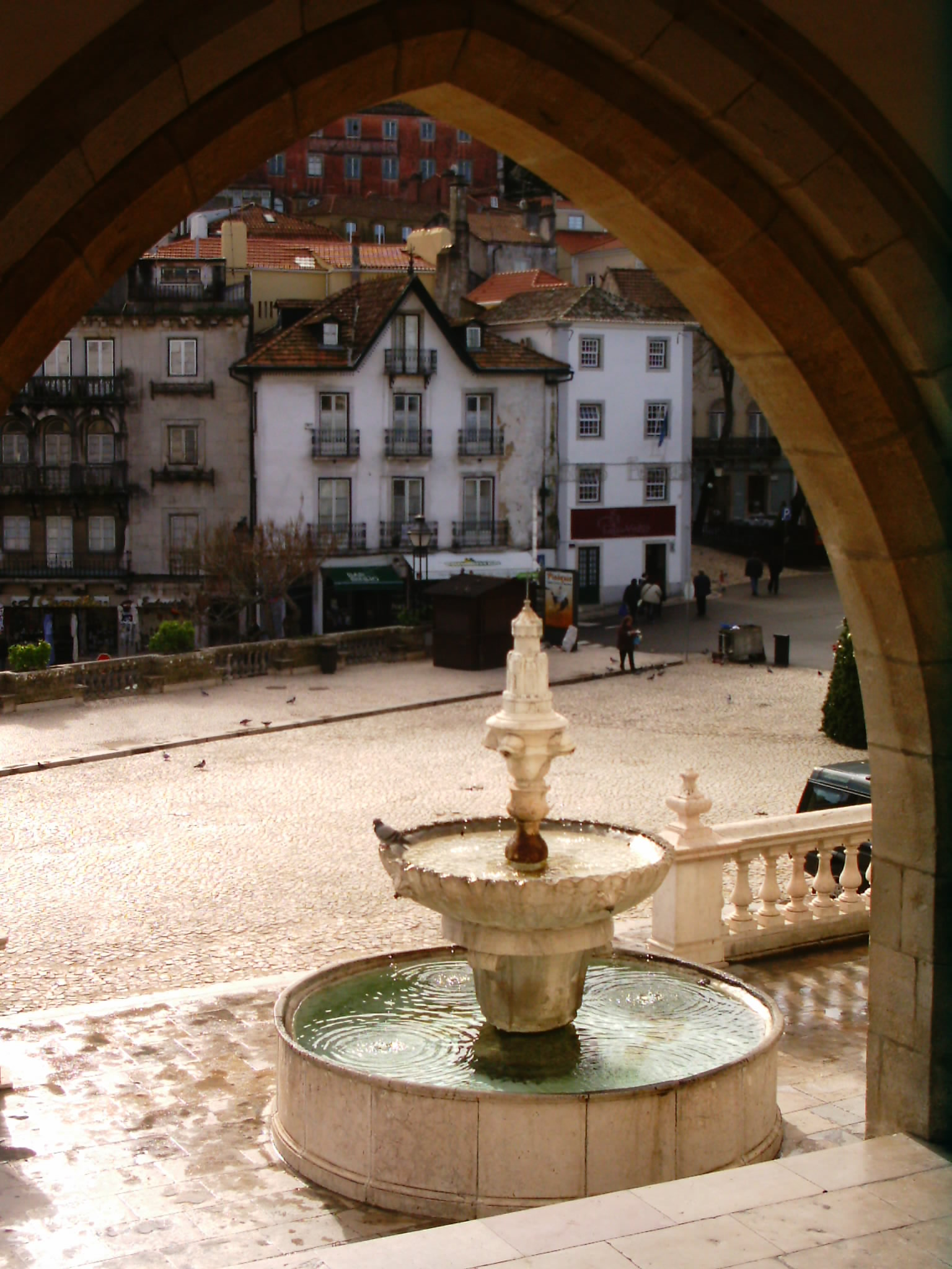 Palácio Nacional de Sintra, Portugal. Vista para a fonte em frente à fachada principal.